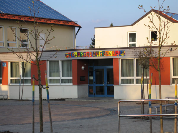 Waldschmidt-Schule in Eschlkam